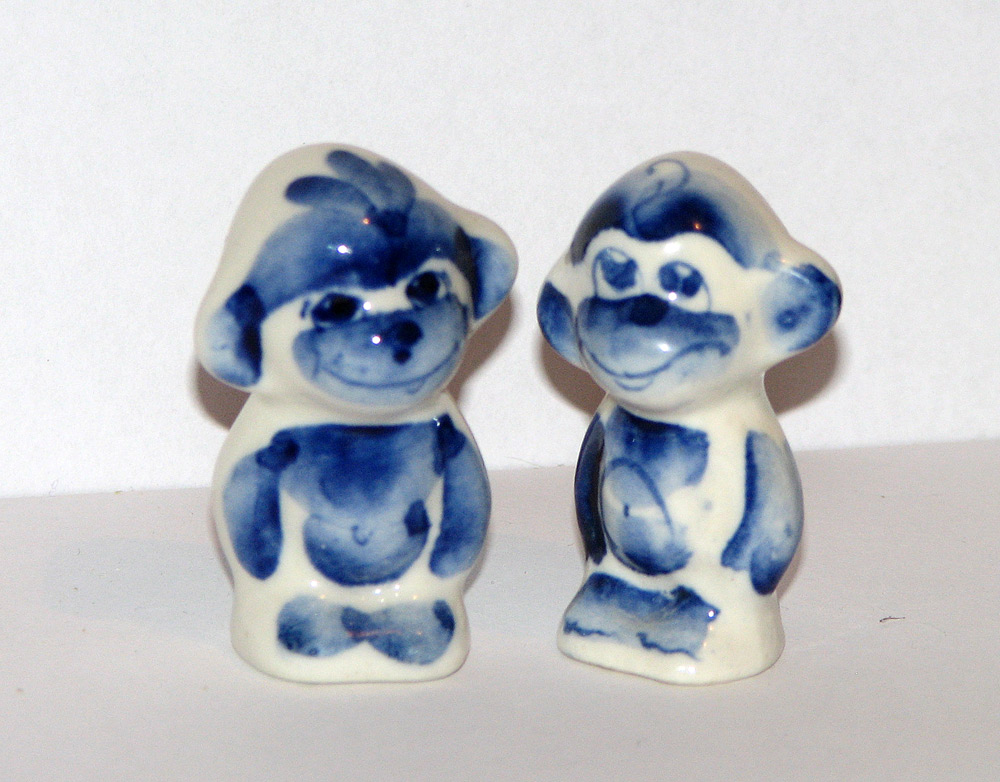 Гжель